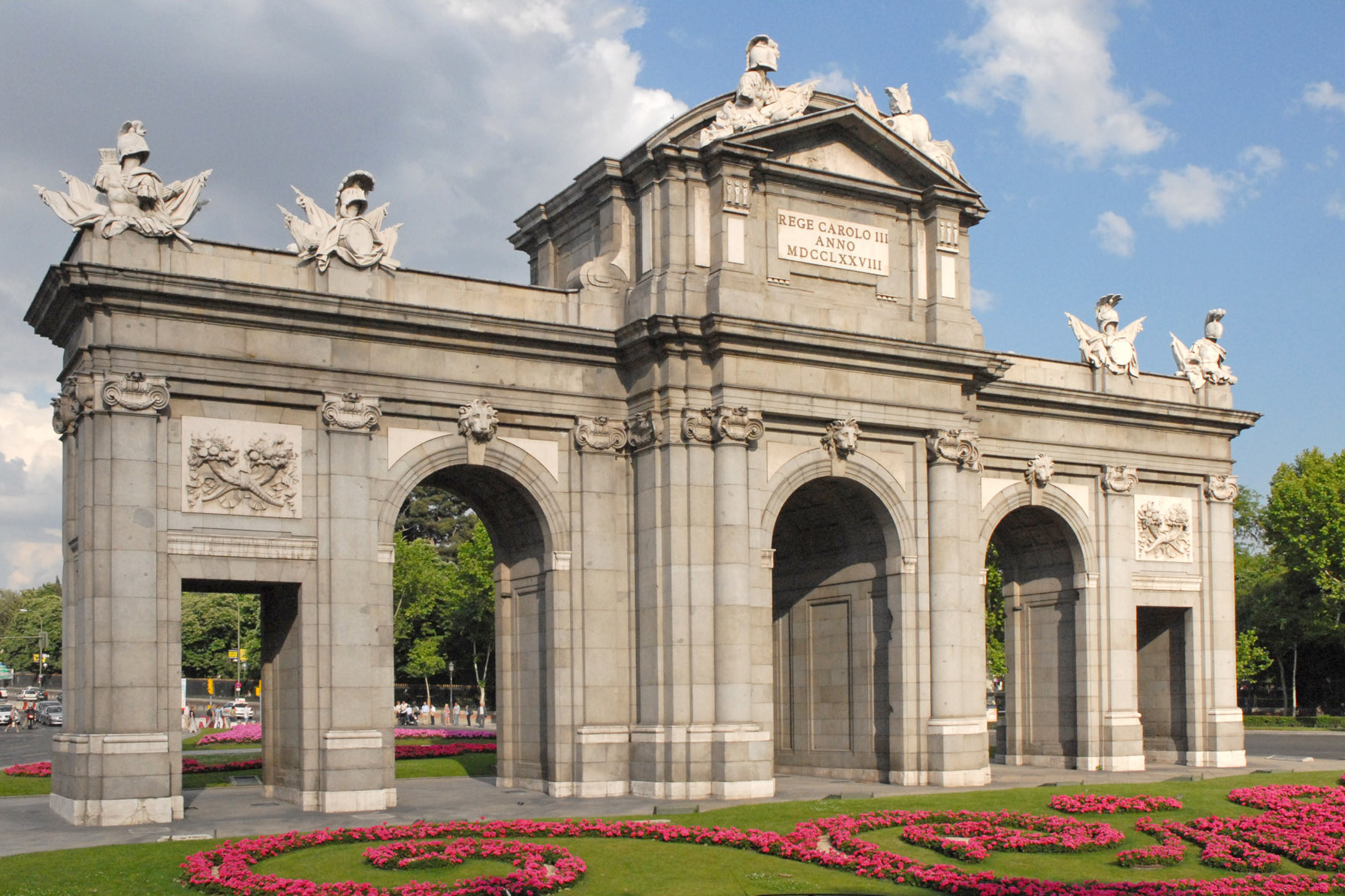 Cette ancienne porte de la ville de Madrid a été construite sous le règne de Charles III. Cet arc de triomphe néo-classique, inauguré en 1778, a été conçu par Francesco Sabatini.